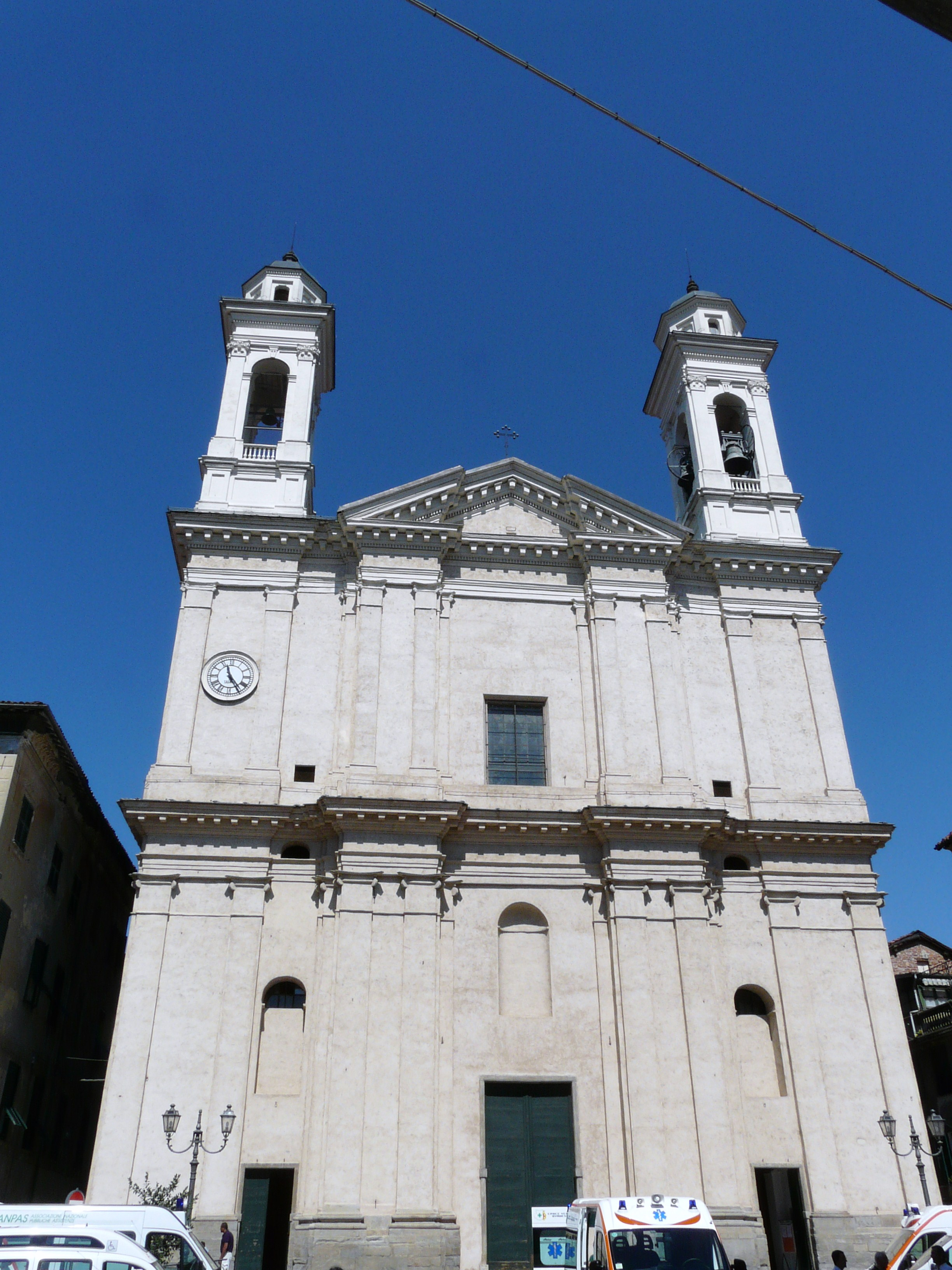 Chiesa di Nostra Signora Assunta, Ovada, Piemonte, Italia